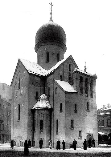 Церковь святого Николая Чудотворца и благоверного великого князя Александра Невского (Николо-Барградская) при Императорском Православном Палестинском Обществе (перекресток 2-й Рождественской ул., Калашниковского пр. и Мытнинской ул.). Санкт-Петербург. Взорвана в 1932 году.